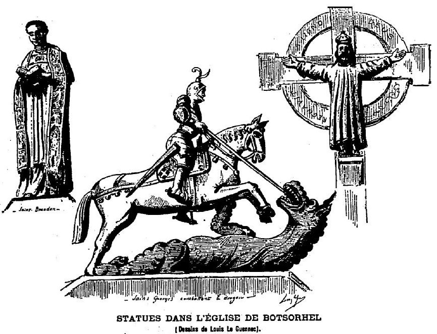 Statues dans l'église de Botsorhel (dessins de Louis Le Guennec)